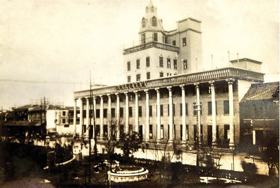 中文（中国大陆）: 30年代的国货陈列馆